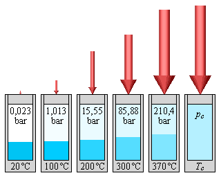 Dampfdruck von Wasser bei verschiedenen Temperaturen